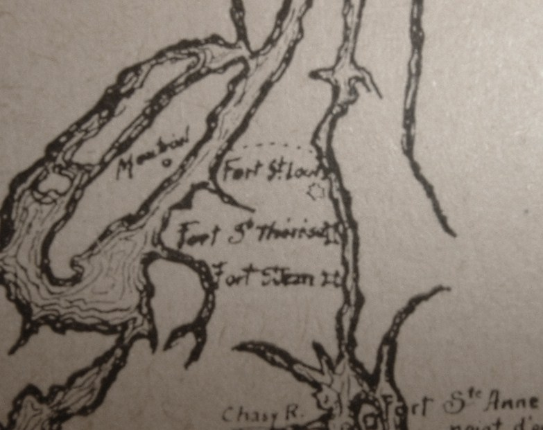 Carte des forts du Richelieu dressée en 1666 pour la campagne du Régiment de Carignan-Salières.